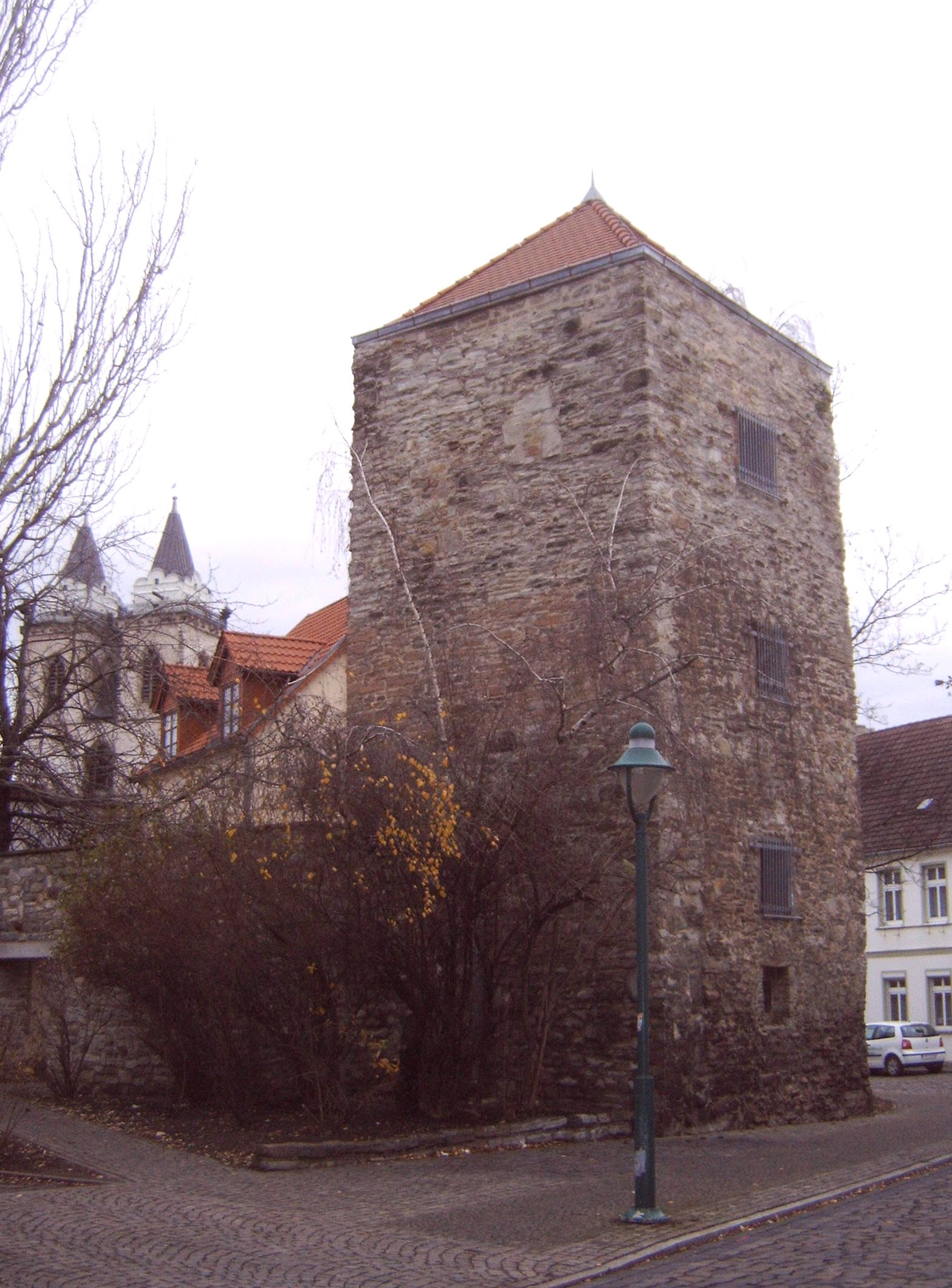 Pfännerturm in Bad Salzelmen, Schönebeck (Elbe)